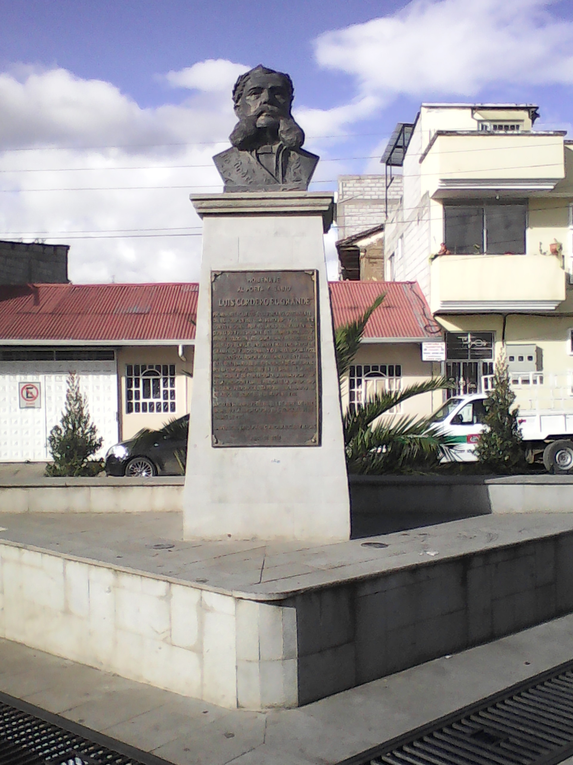 Busto de Luis Cordero, en la parroquia del mismo nombre, Azogues, Ecuador